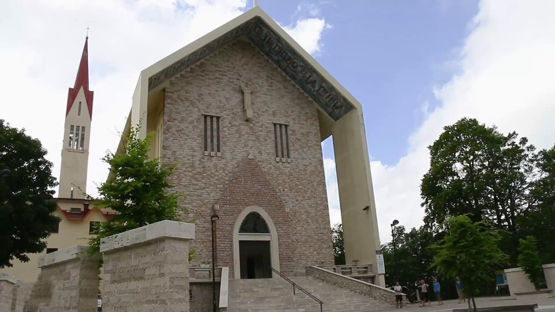 Il tempio votivo di San Francesco nel paese di Pian de' Valli, sul monte Terminillo (provincia di Rieti)